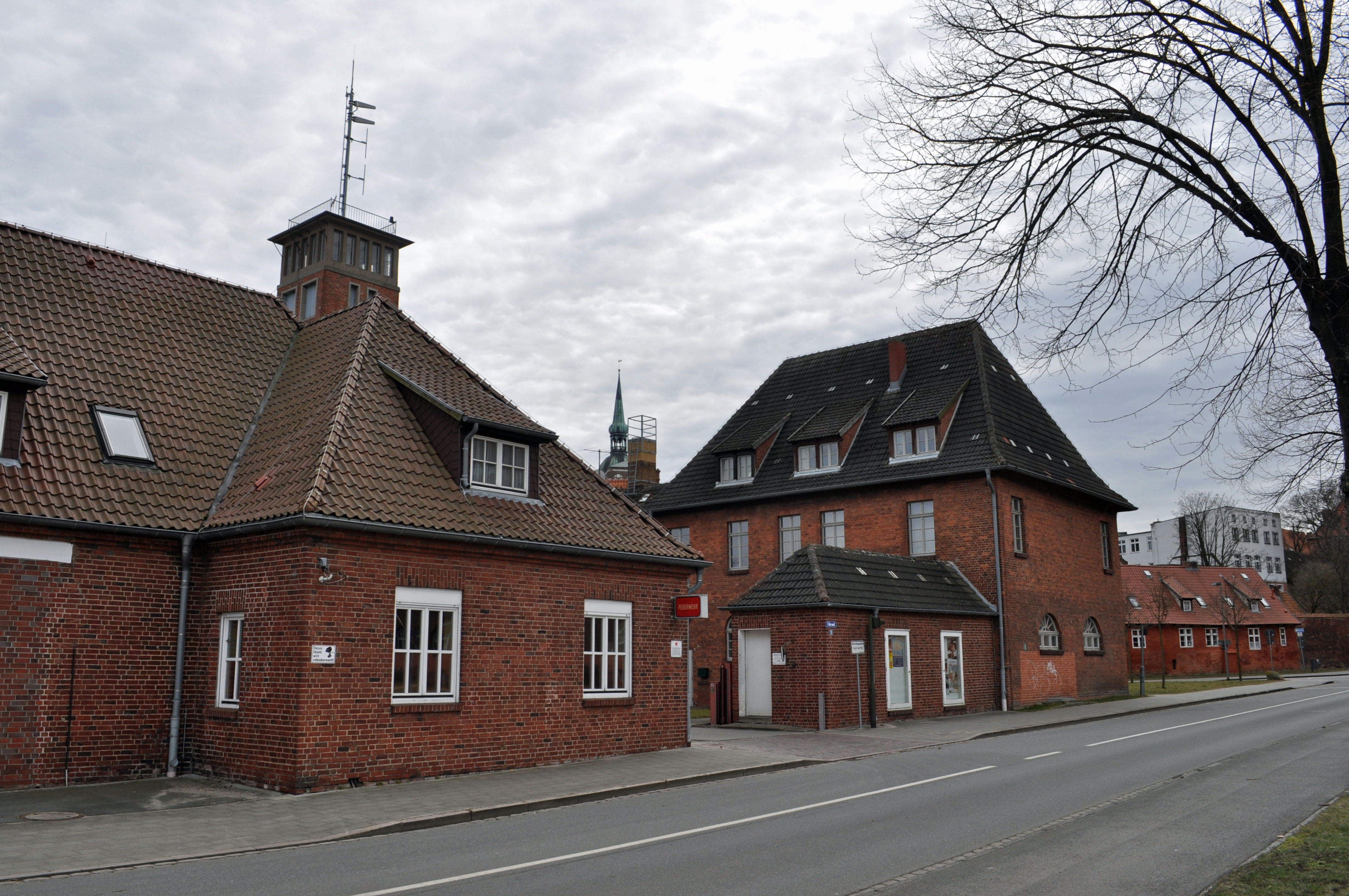 Gebäude bzw. Gebäudedetail in Stralsund. Straße und Hausnummer siehe Dateiname.